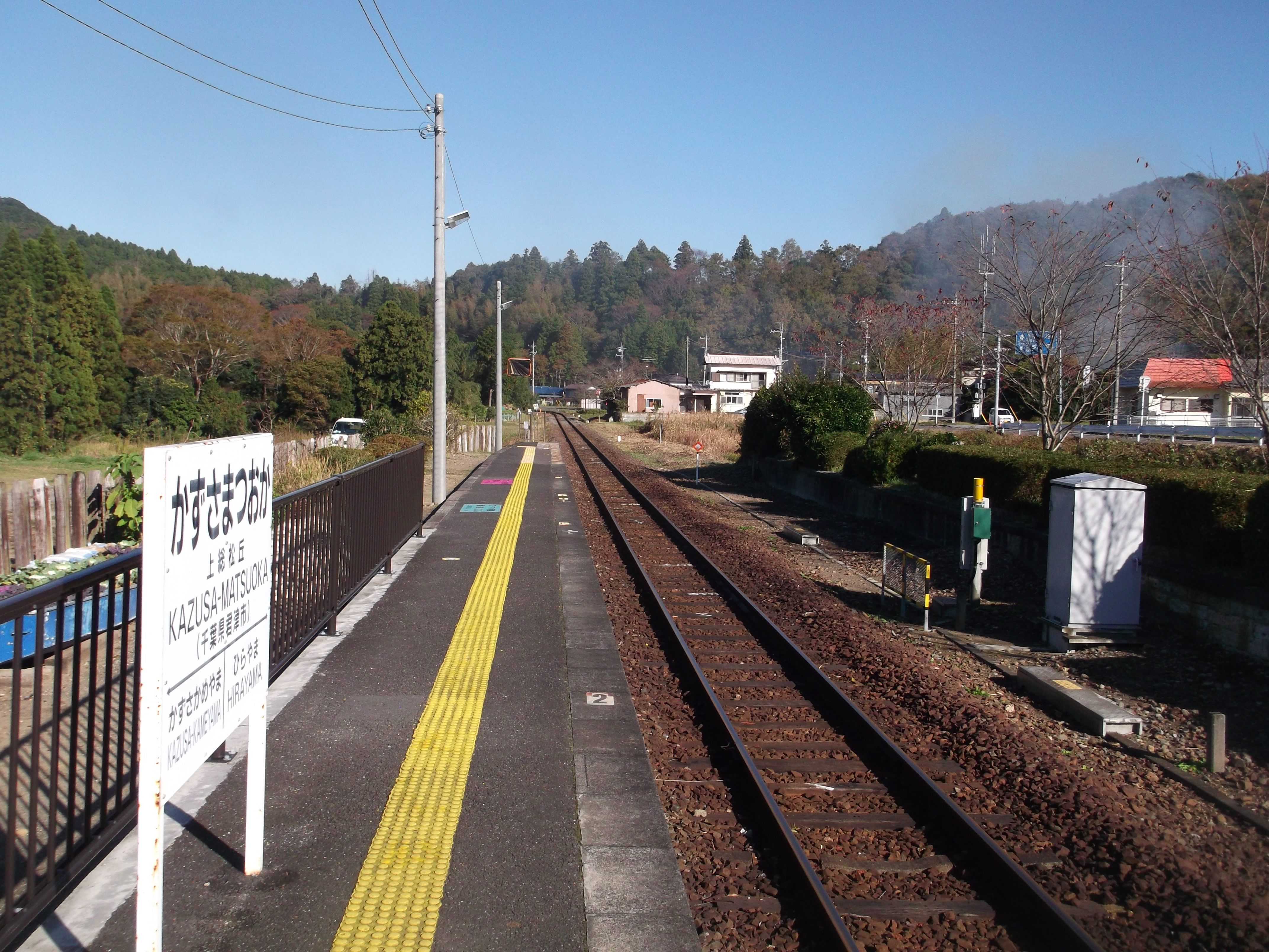 JR久留里線上総松丘駅ホーム